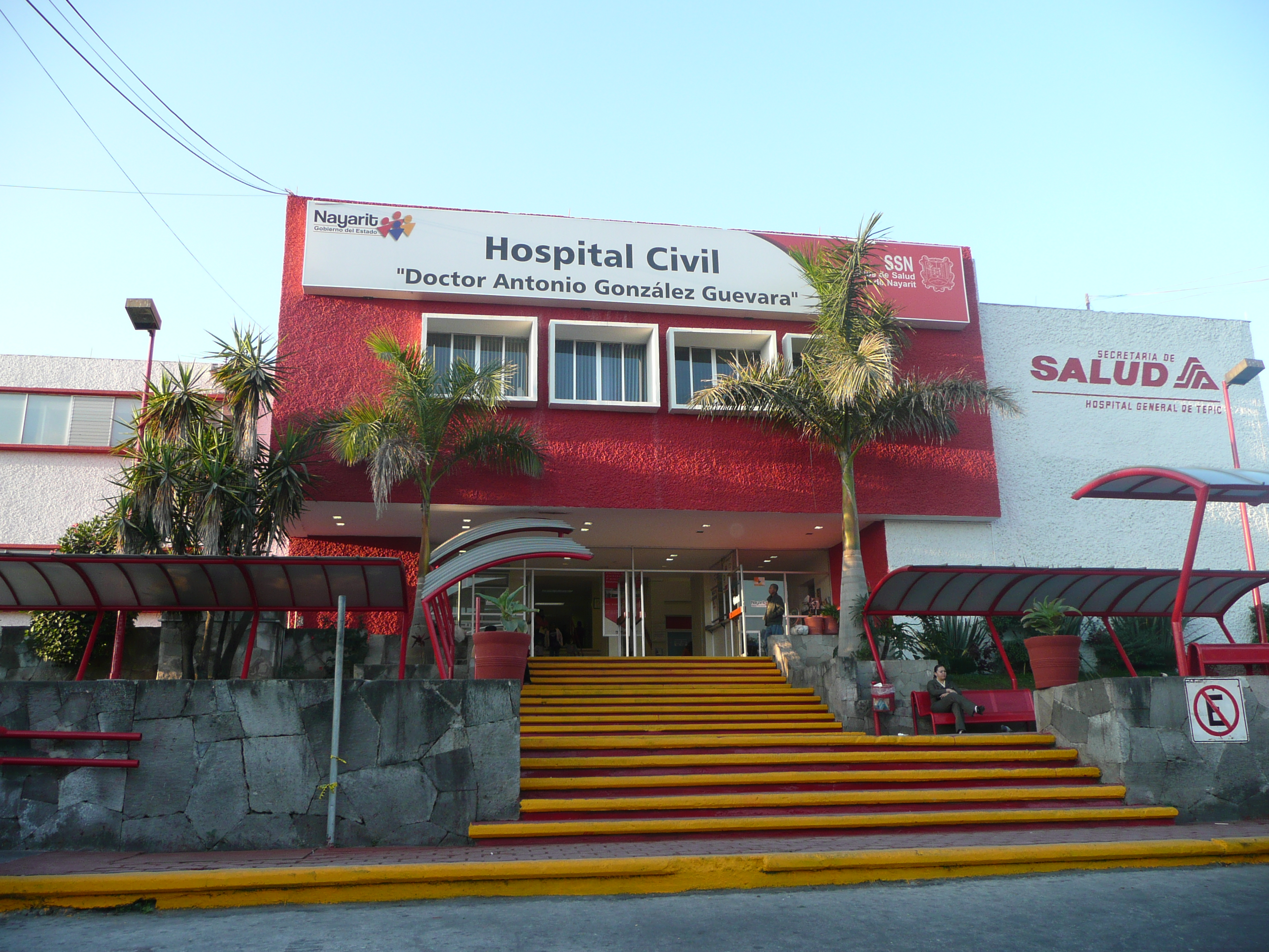 Fotografía tomada al frontispicio de la institución.